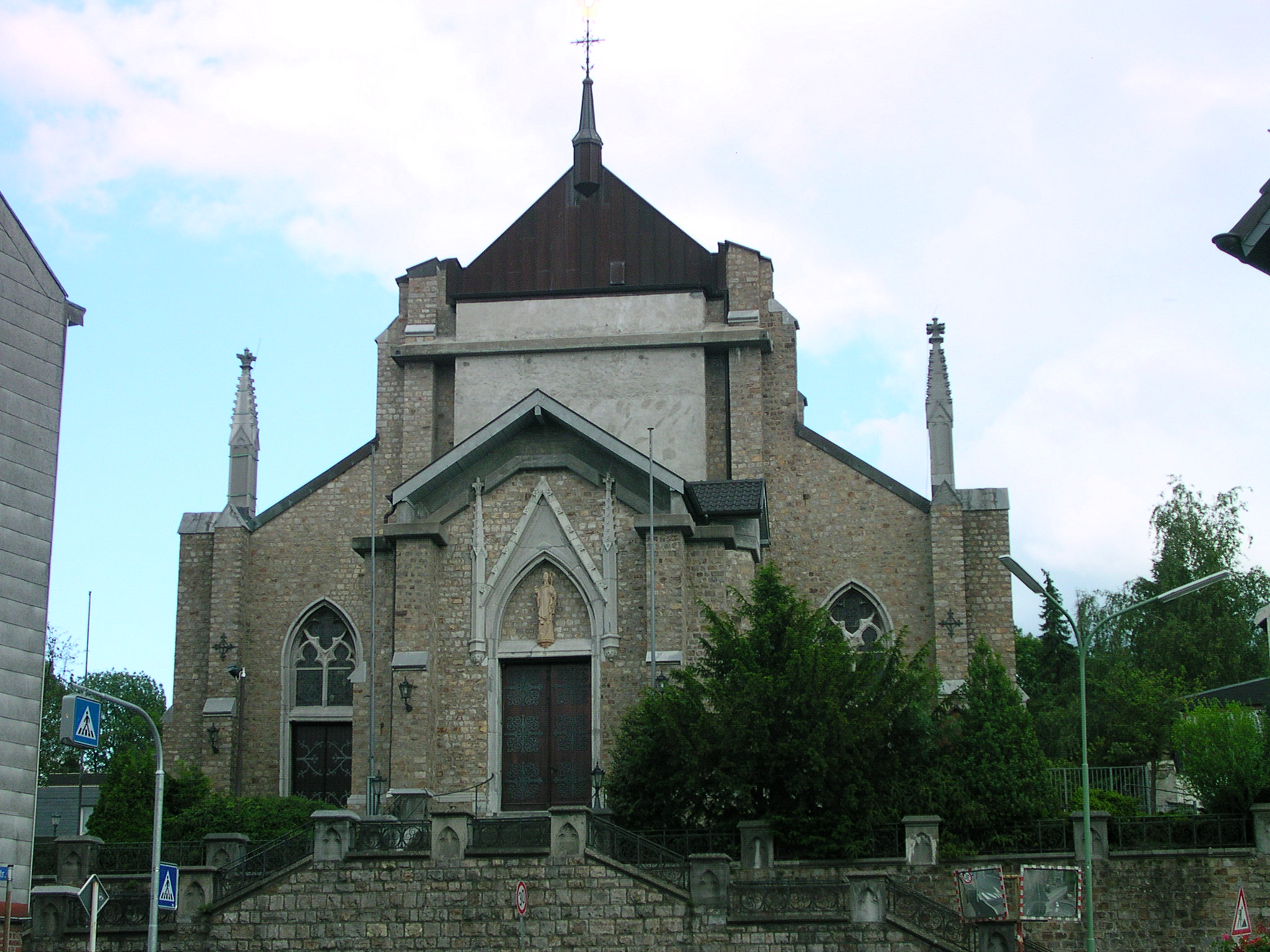 Stolberg-Büsbach, Hubertuskirche nach Abriß des gotischen Turms